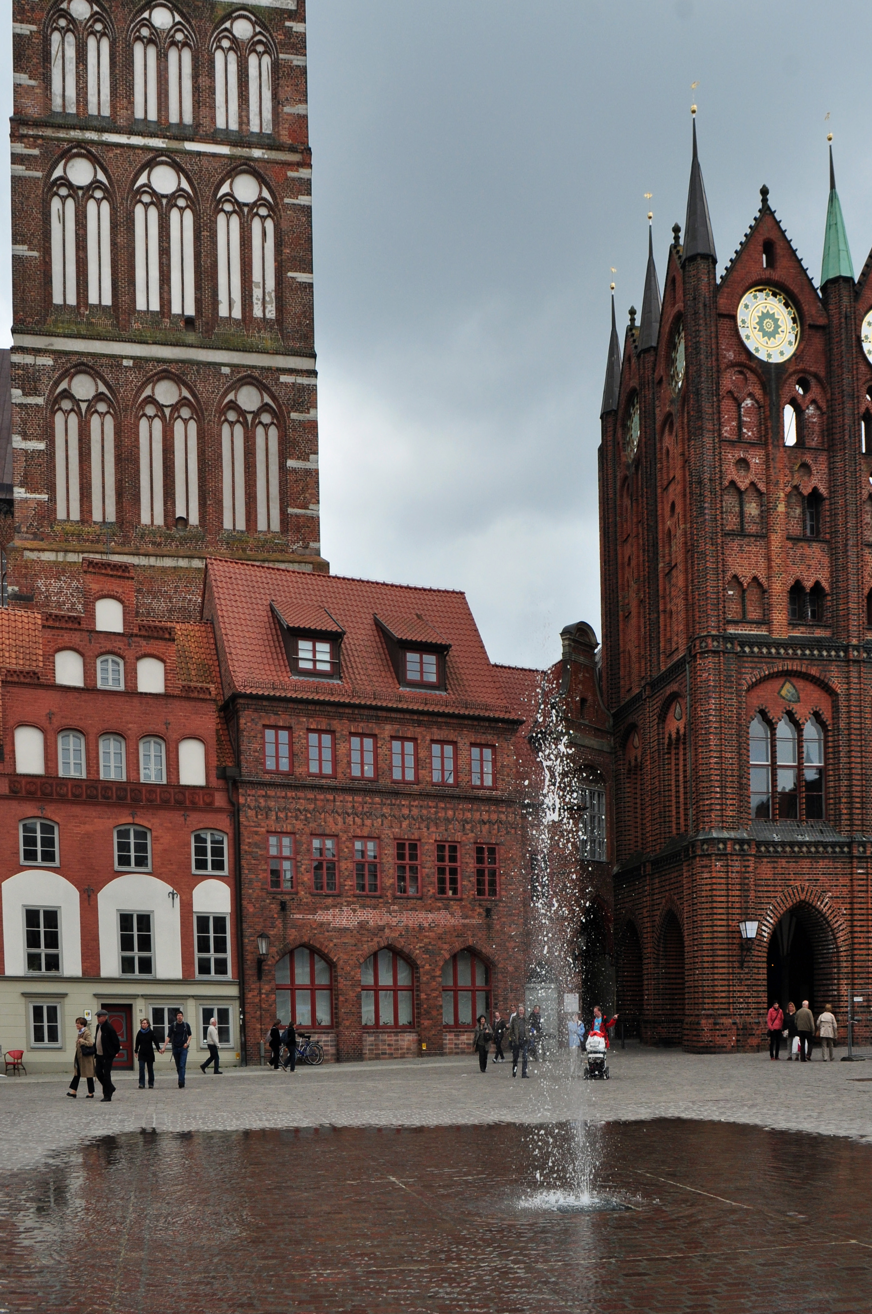 Fontäne auf dem Alten Markt in Stralsund. Im Hintergrund die Nikolaikirche und das Rathaus.